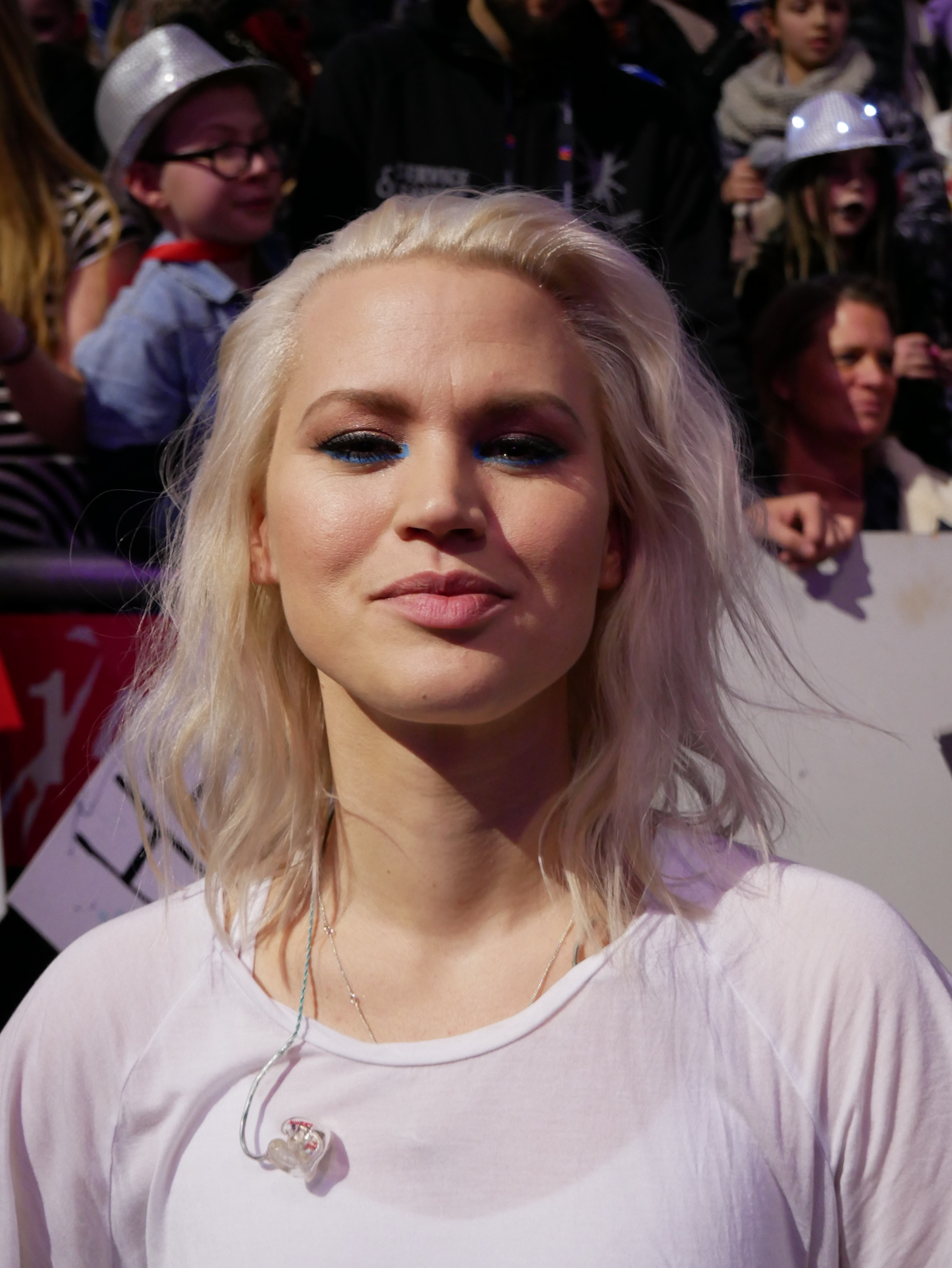 Melodifestivalen 2017, final Ace Wilder